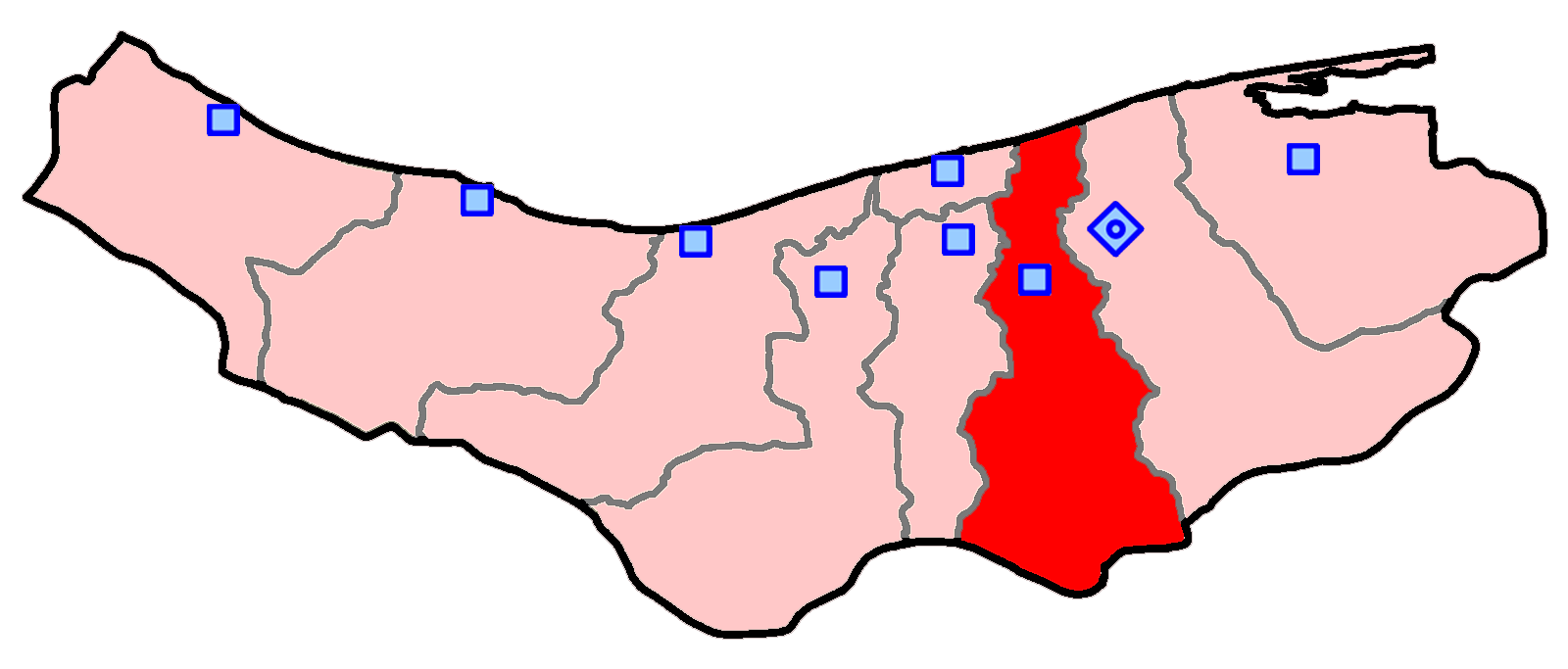 حوزهٔ انتخاباتی قائمشهر، سوادکوه، جویبار، سوادکوه شمالی و سیمرغ برای انتخابات مجلس شورای اسلامی